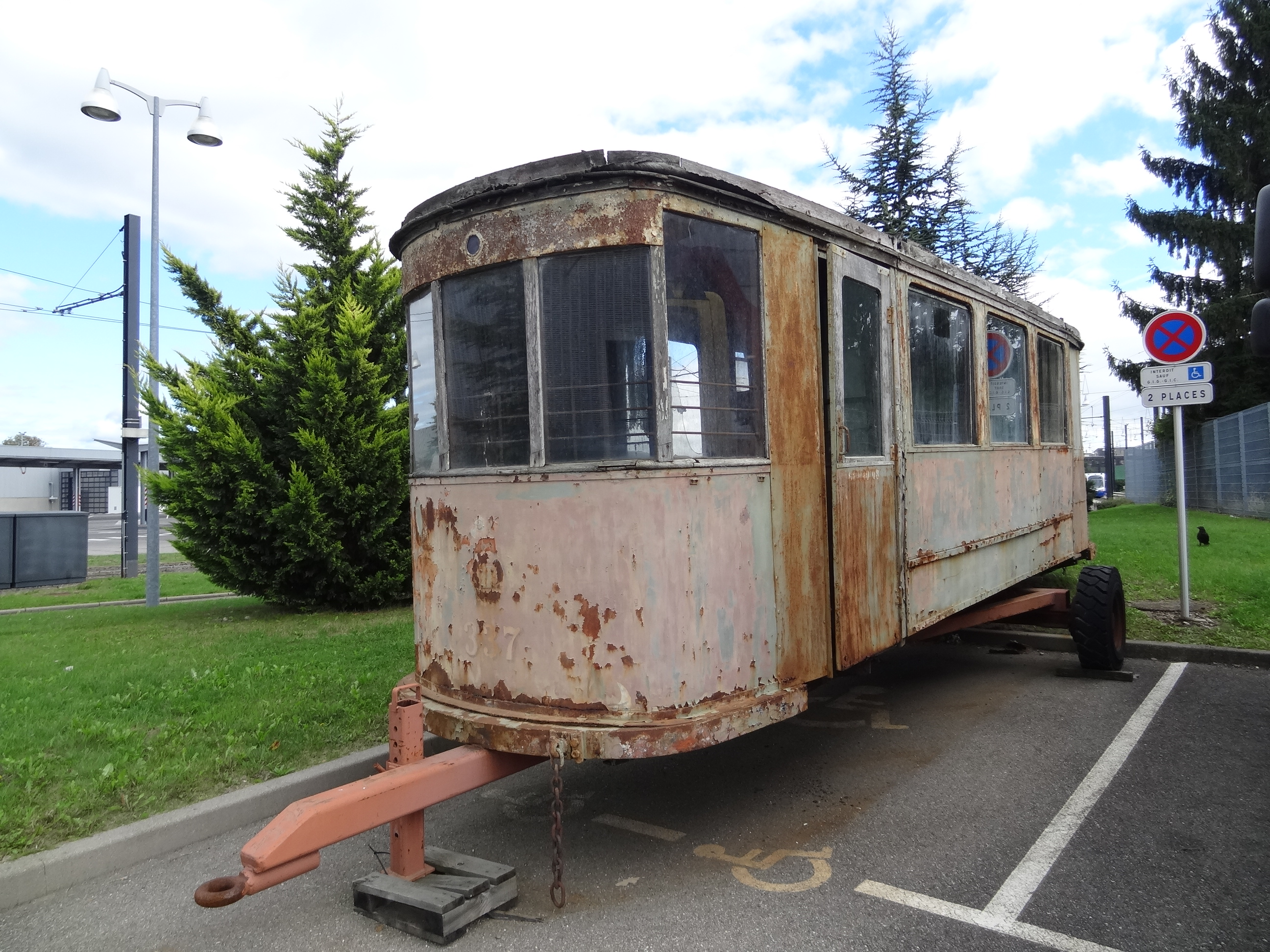 Remorque de l'ancien tramway de Mulhouse, récupérée et conservée par Soléa. Marque De Dietrich (fabriquée dans les années 1920).